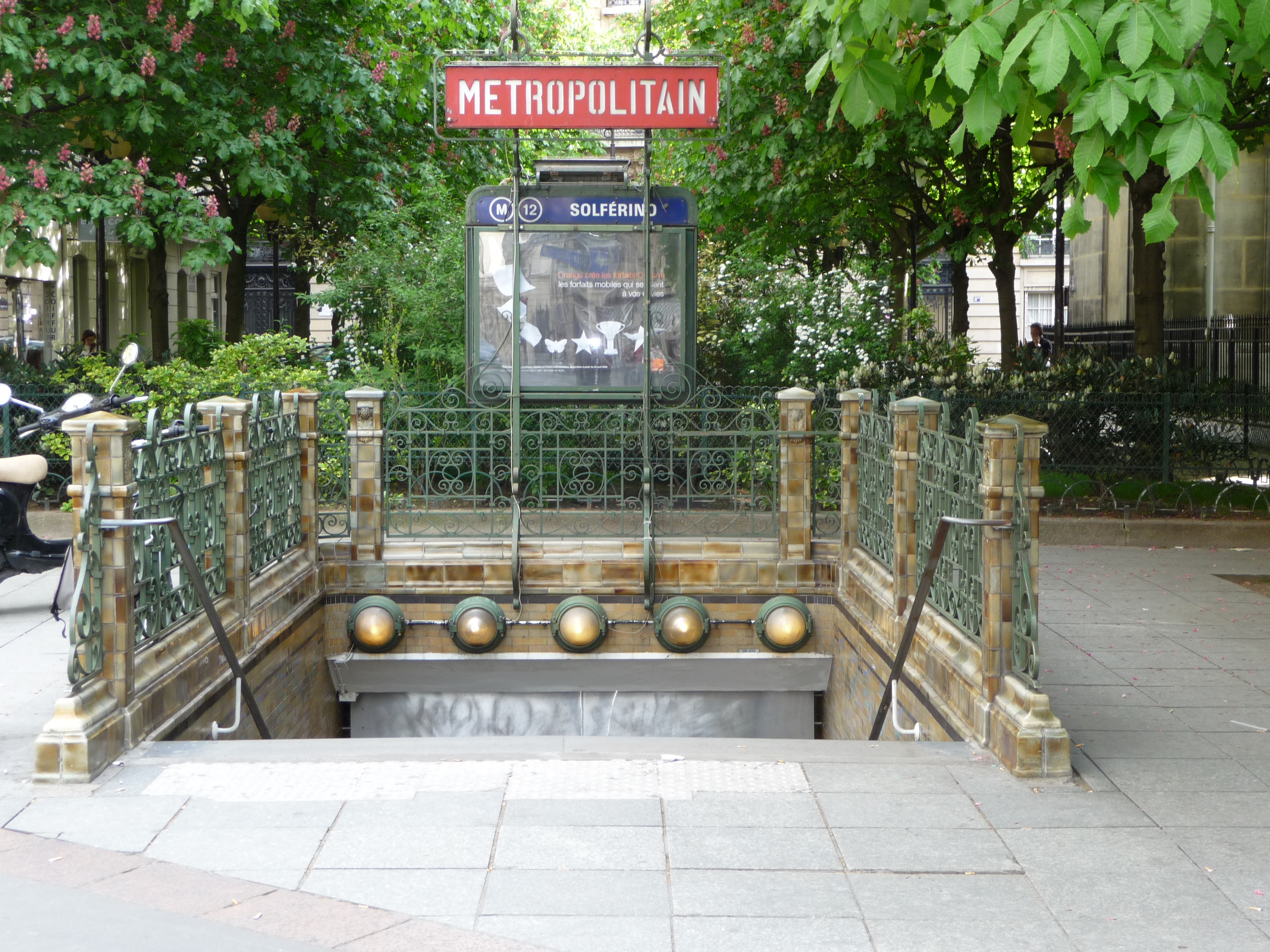 Solférino metro station